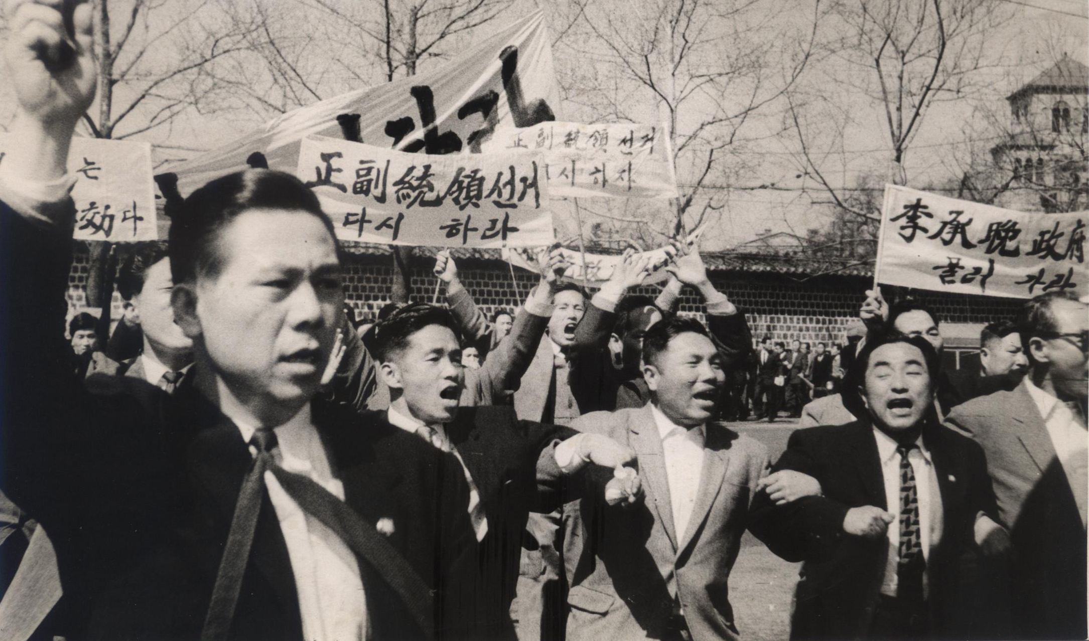 3.15 부정선거에 항의하는 시위에 참가한 이철승